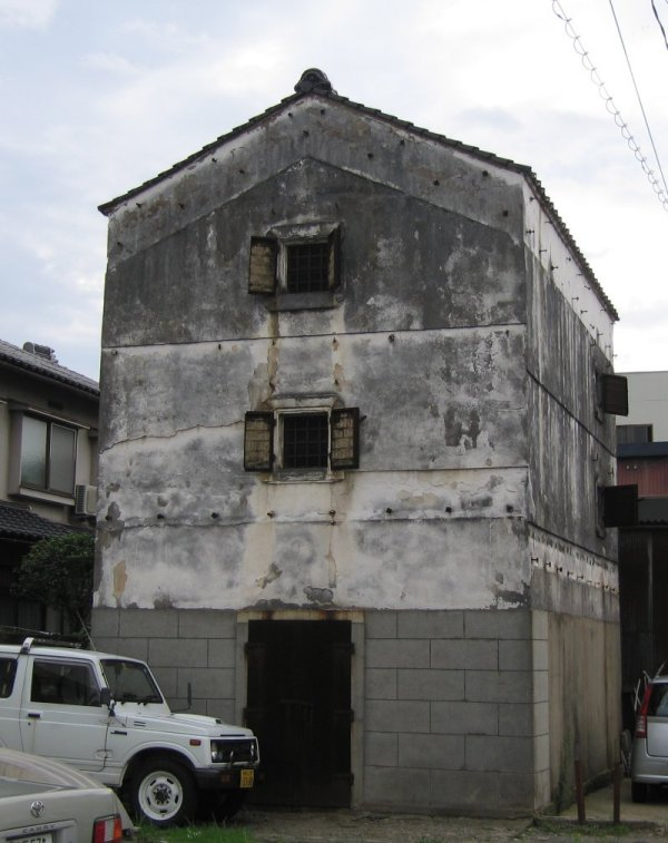 鳥取大火で焼け残った商家の土蔵